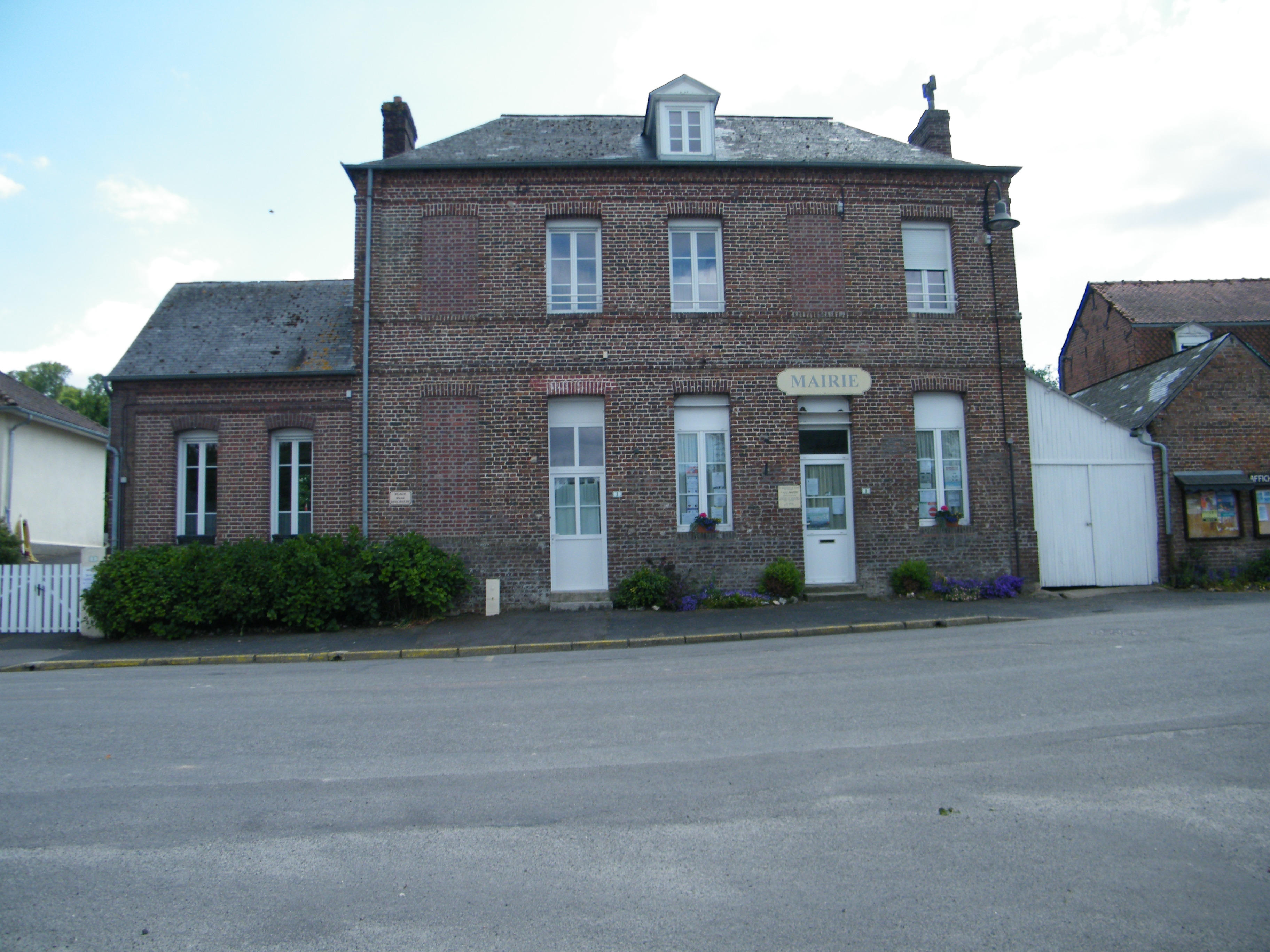 Mairie-école.